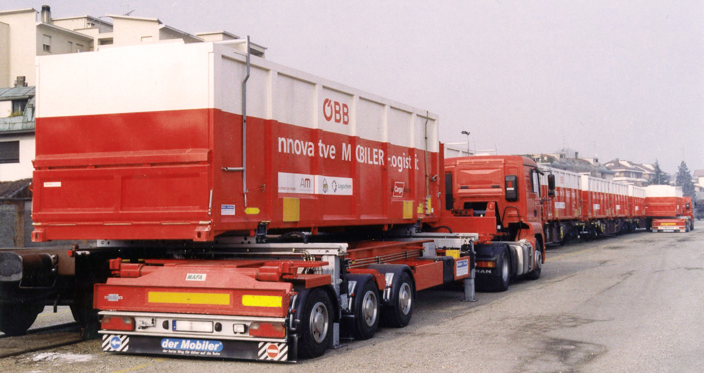 Mobiler LKWs und Güterzug